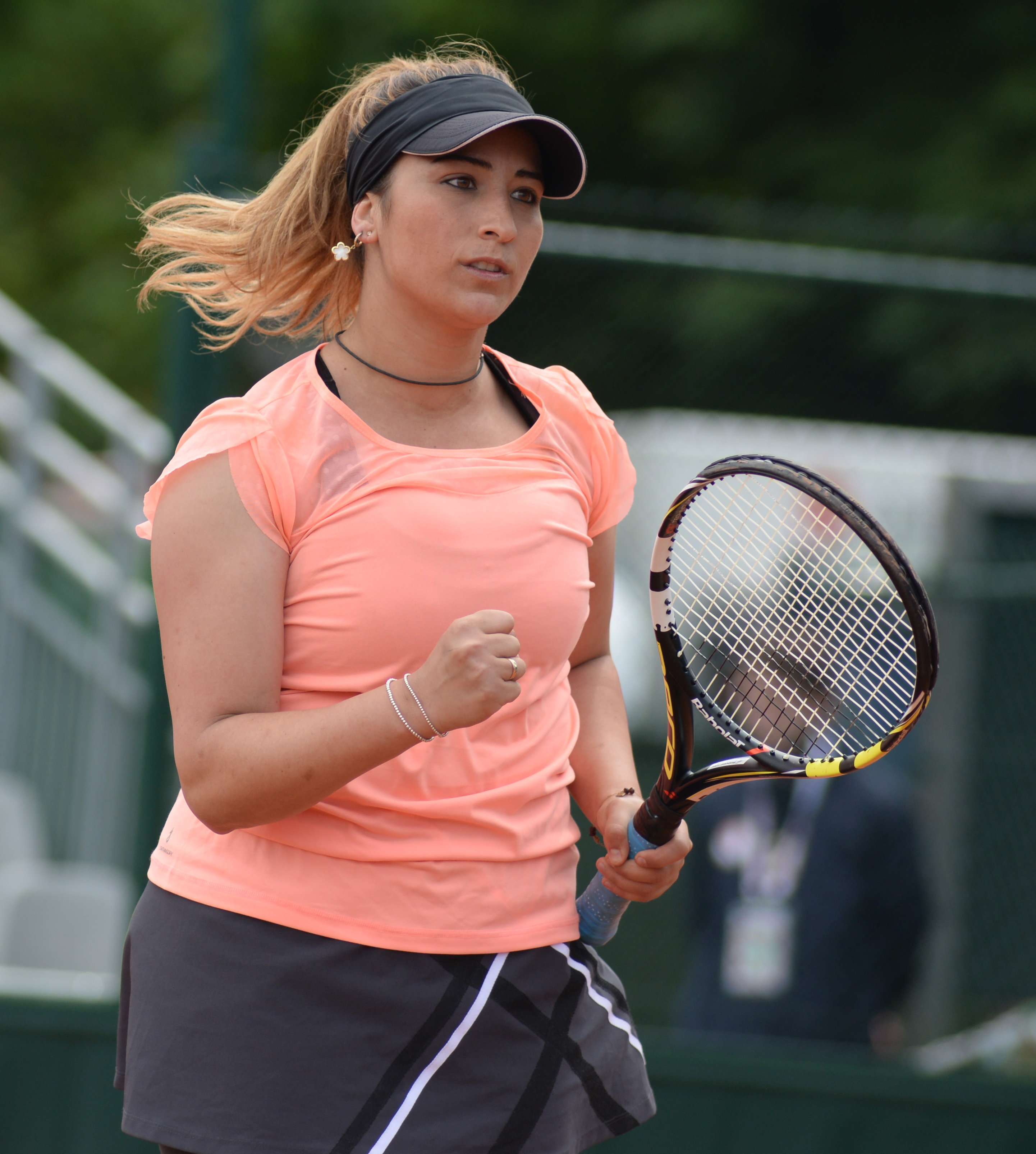 Aravane Rezai